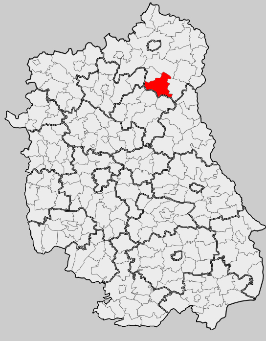 Map of gmina Wisznice, Biała Podlaska county, Lublin voivodship Mapa gminy Wisznice, powiat bialski, województwo lubelskie